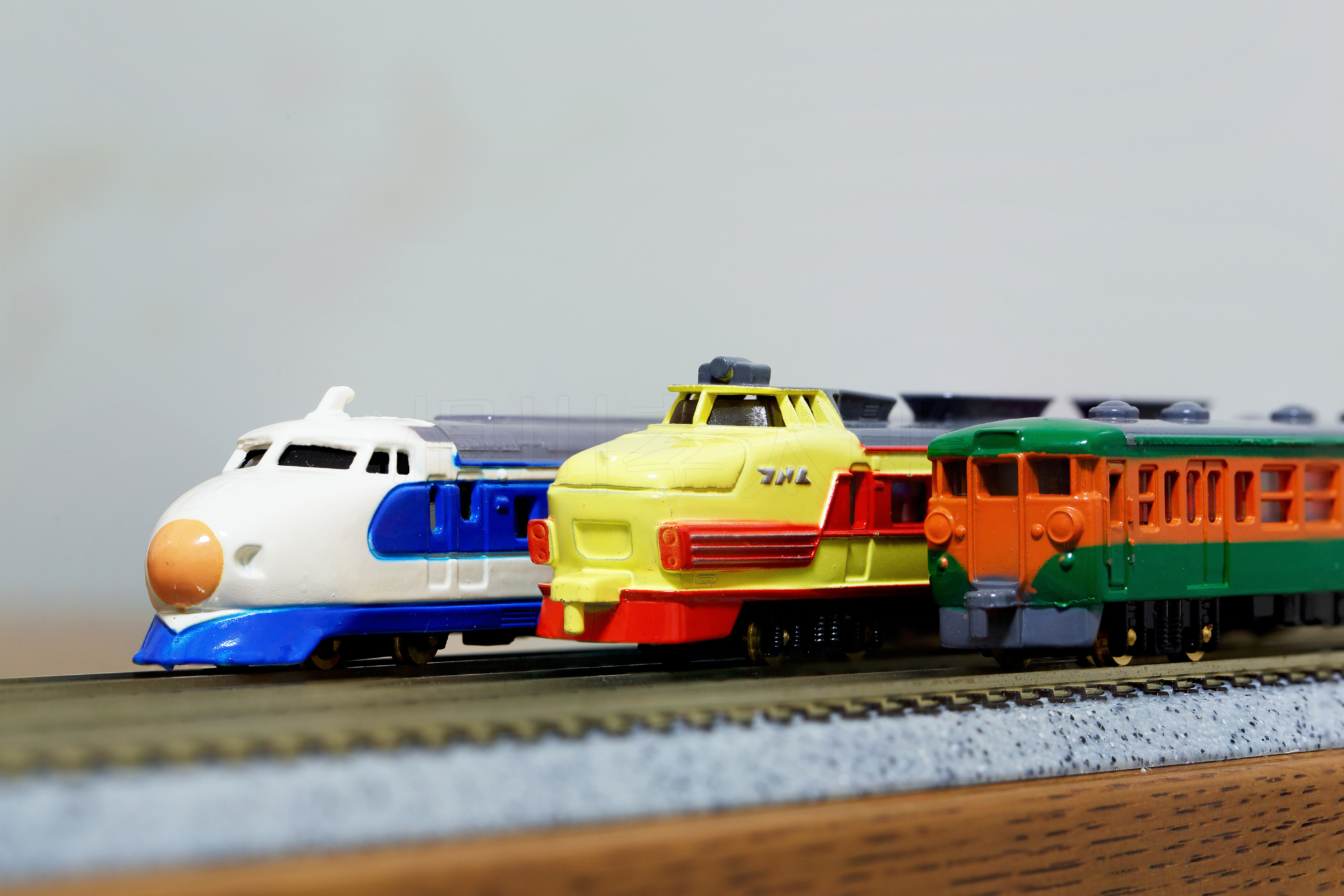 ダイカスケール3種（焦点合成）